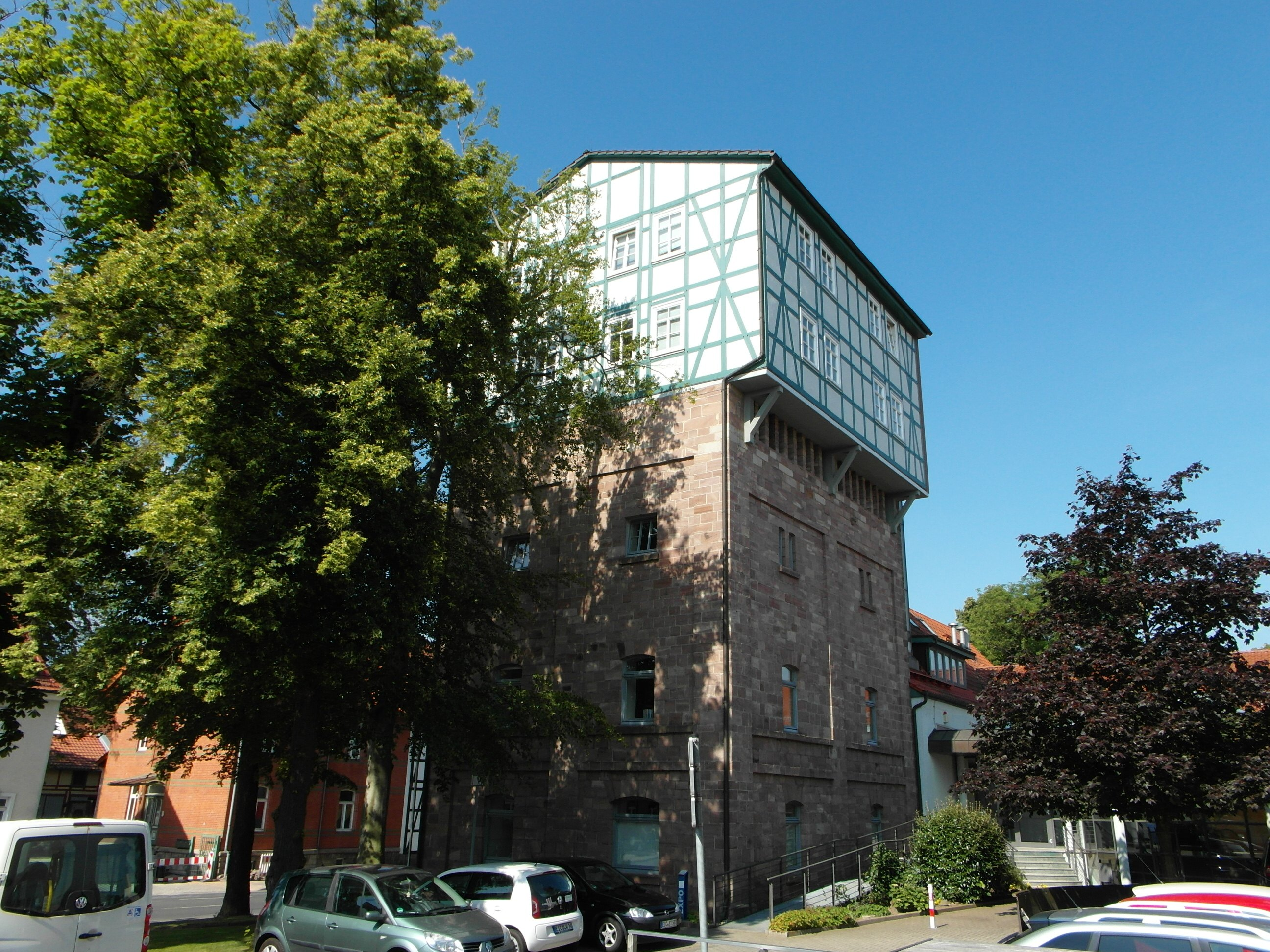 in einem alten Bahn-Wasserturm